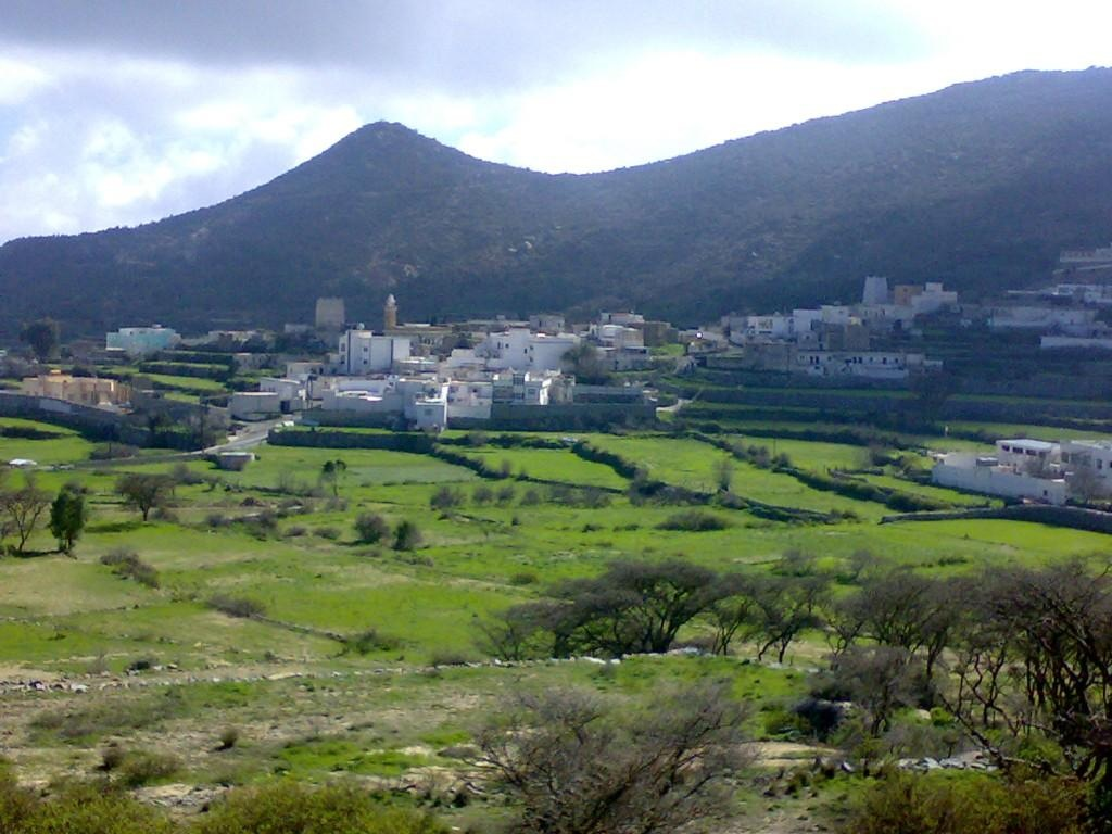 قرية آل قحطان ويظهر جبل مرير يمين ورأس النحرة يسار